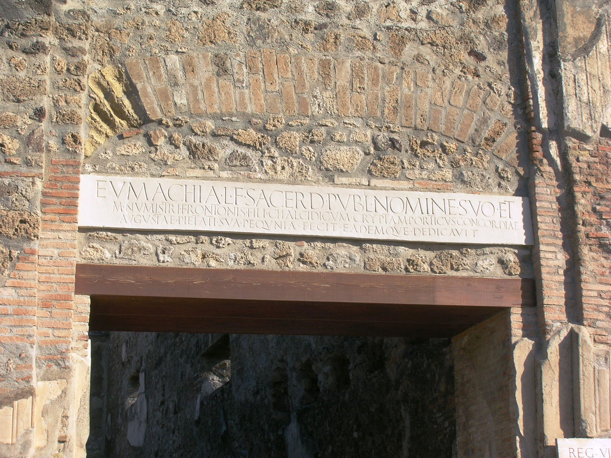 Edificio di Eumachia